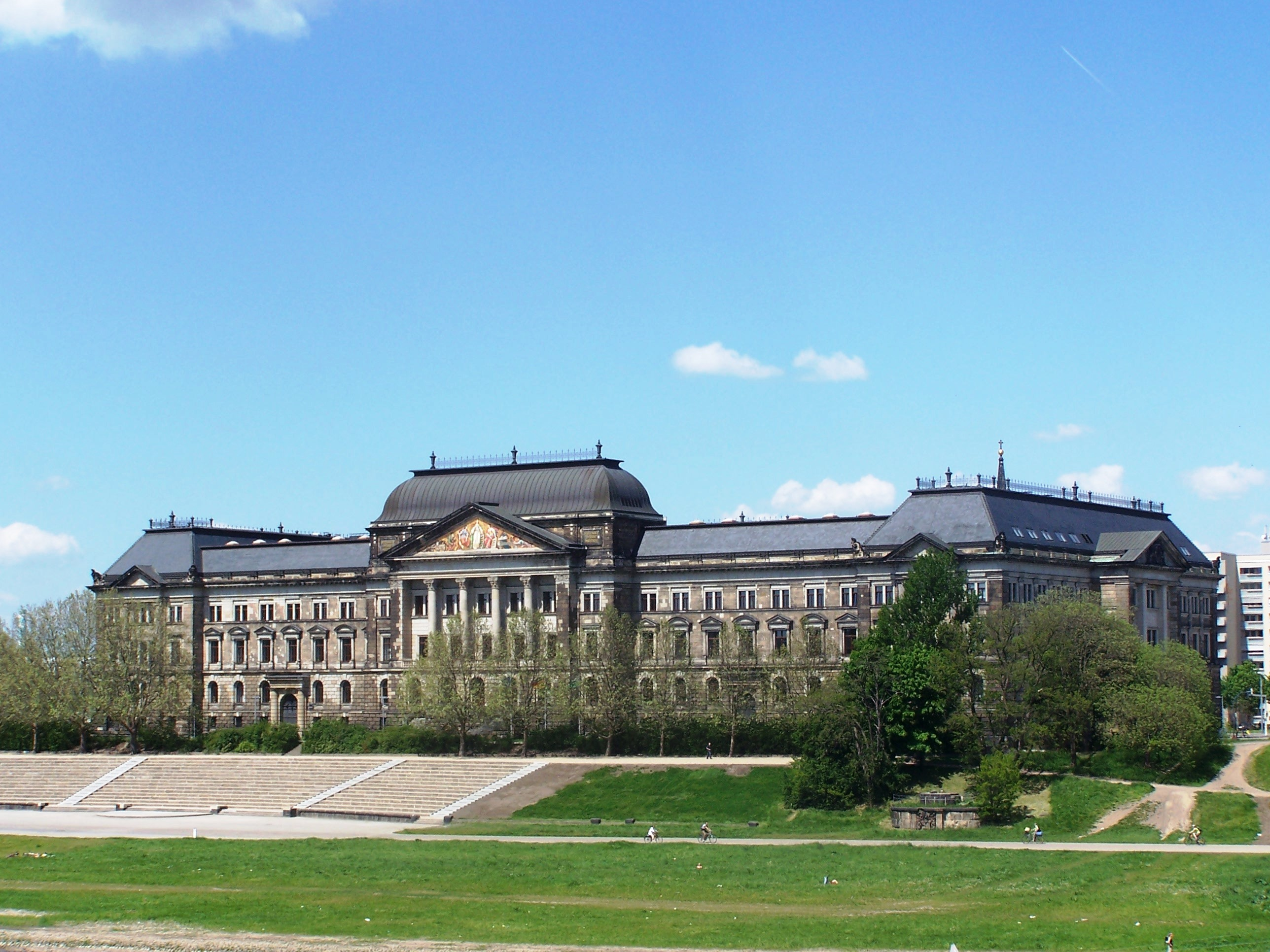 Sächsisches Staatsministerium der Finanzen in der Inneren Neustadt in Dresden